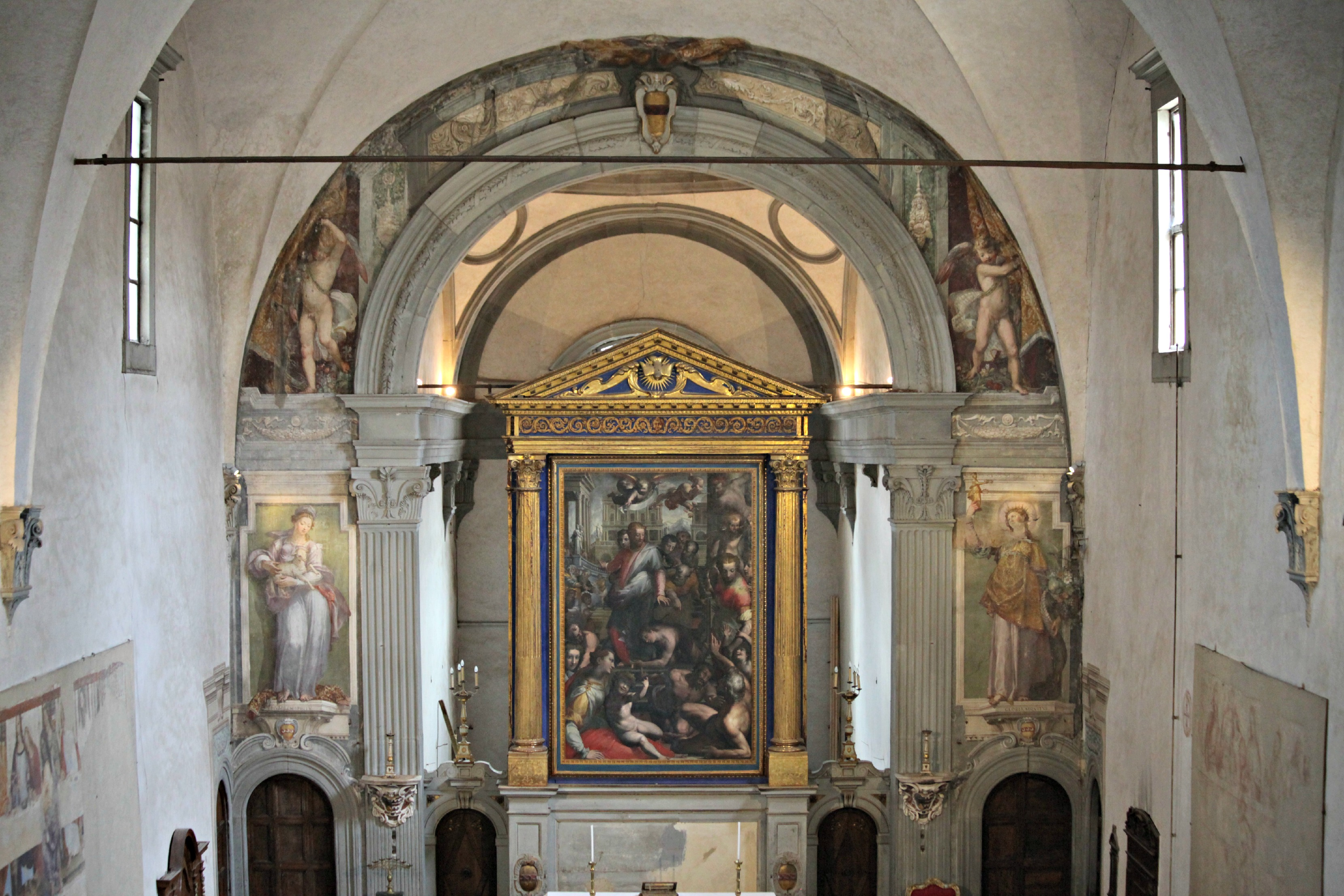 Interno della chiesa di San Bartolomeo a Monte Oliveto, Florence